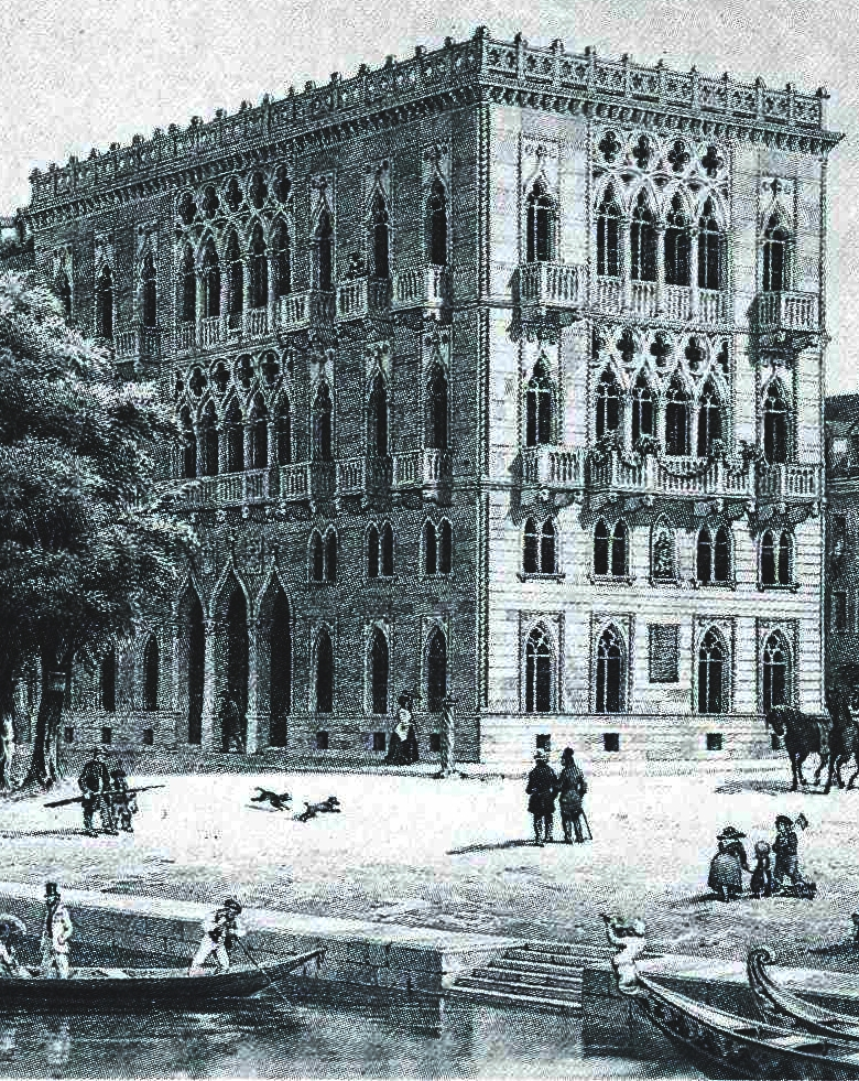 Venezianisches Palais in Dresden, Terrassenufer 3, erbaut um 1845, 1945 zerstört